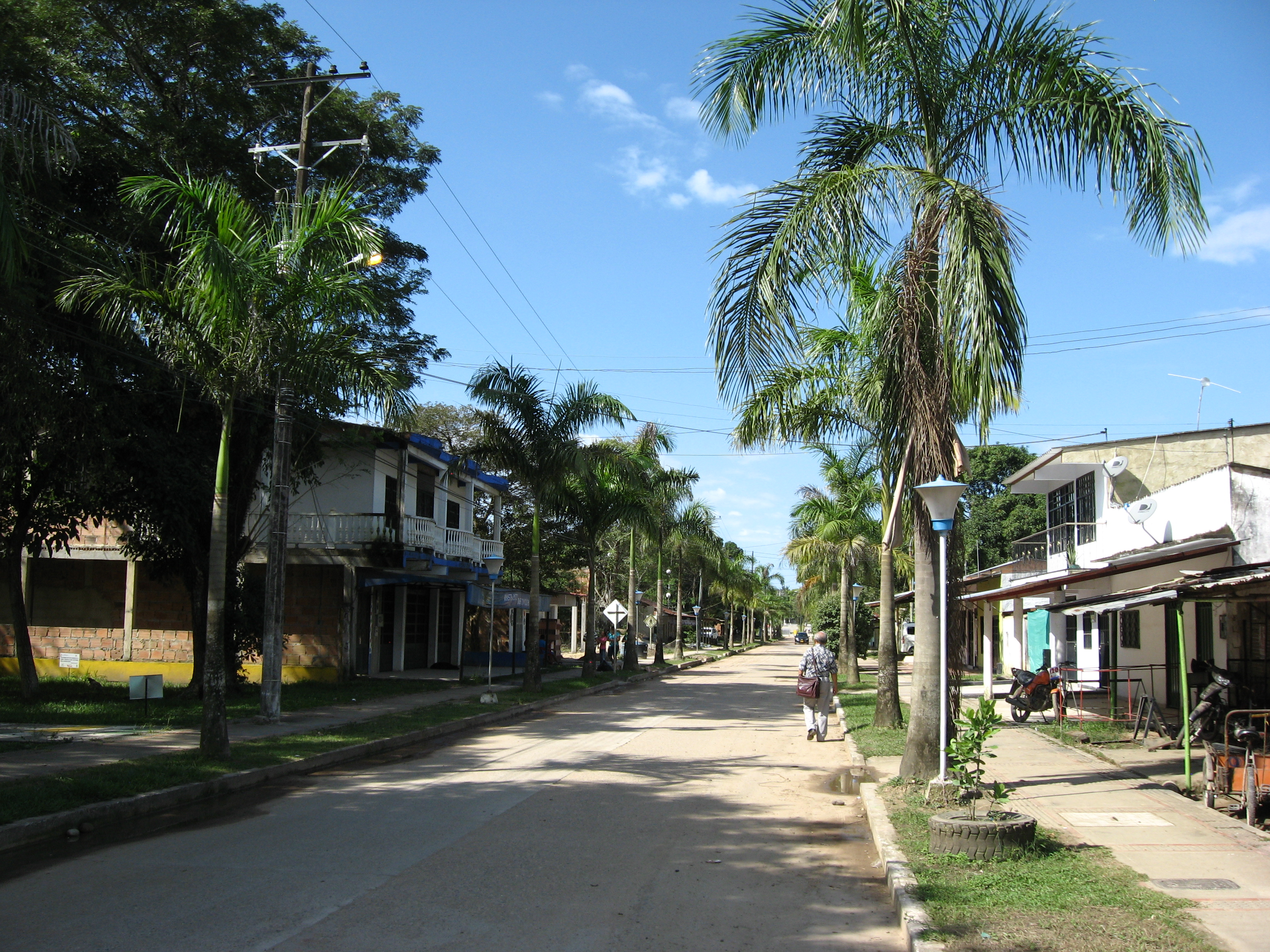 Calle principal que lleva al embarcadero en el bello municipio de Cabuyaro Esta fotografía fue tomada en el municipio colombiano con código 50124.